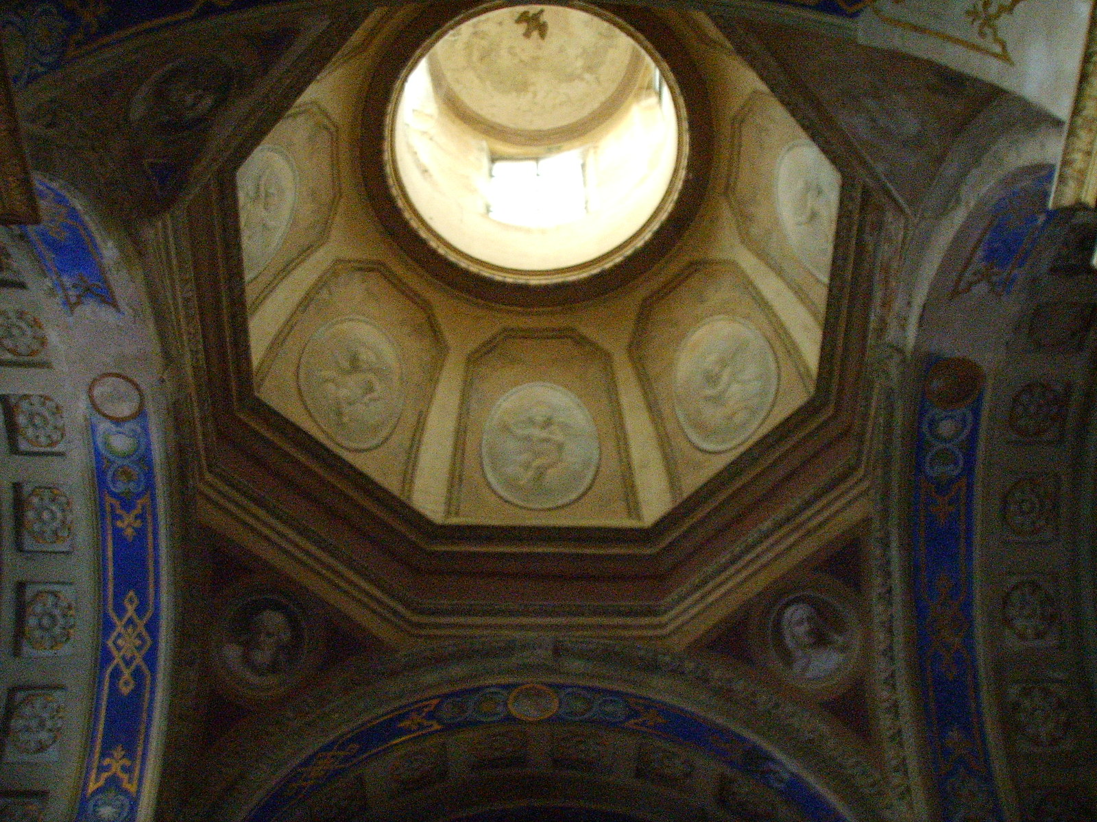 Zibello chiesa